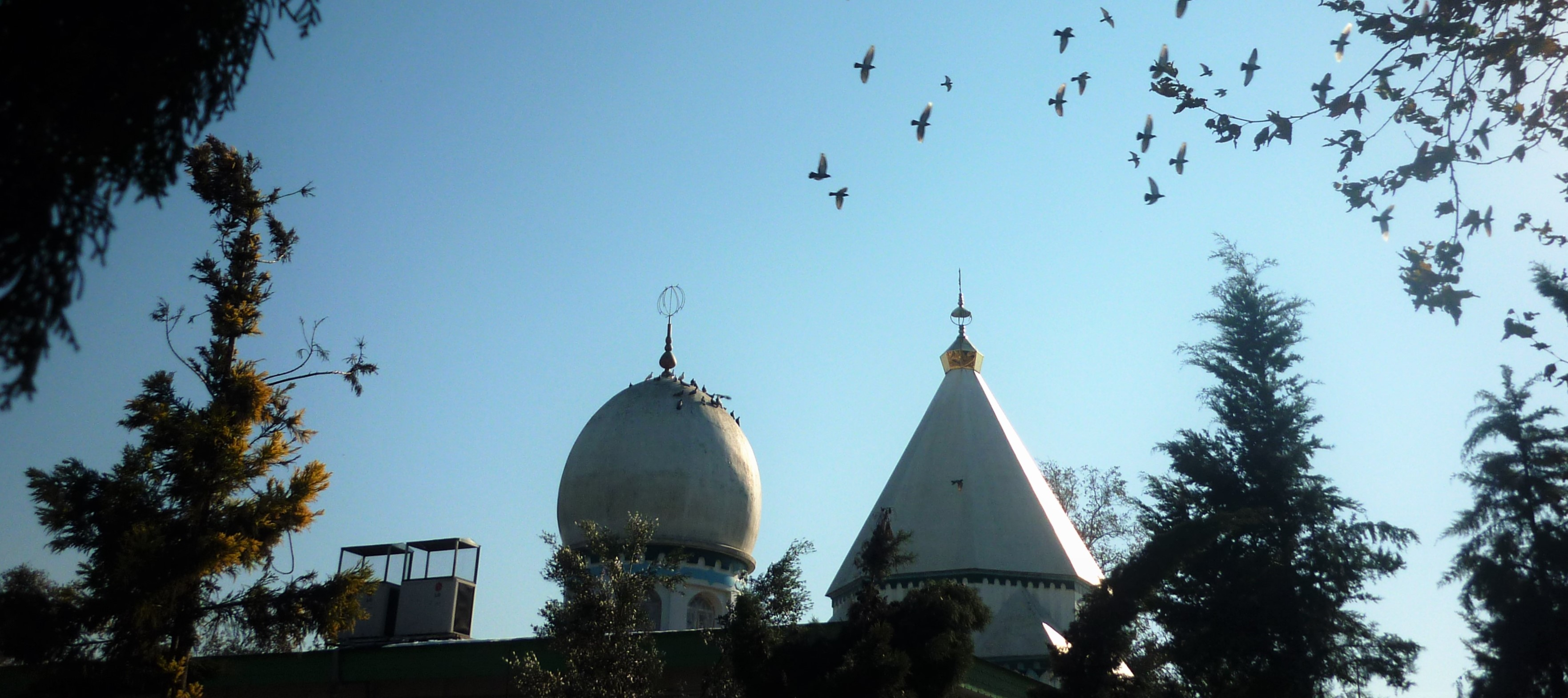 Das Imamzadeh Ibrahim ist ein Imamzadeh in Amol, welches einem Nachkommen Imam Kazhims (a.) namens Ibrahim gewidmet ist.